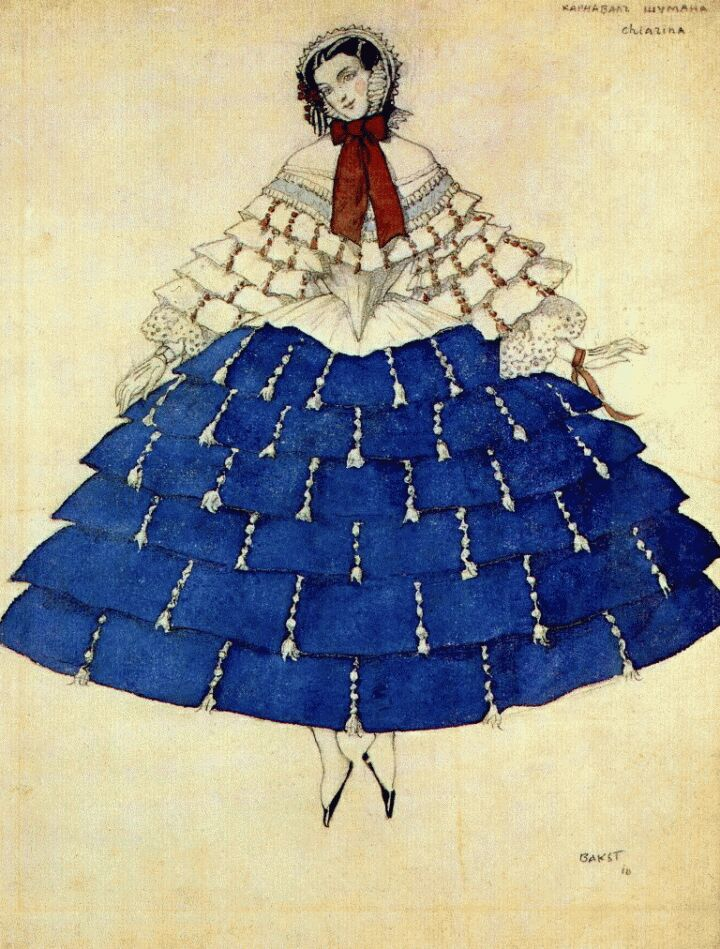 Сhiarina. Эскиз костюма для "Карнавала" Шумана. 1910